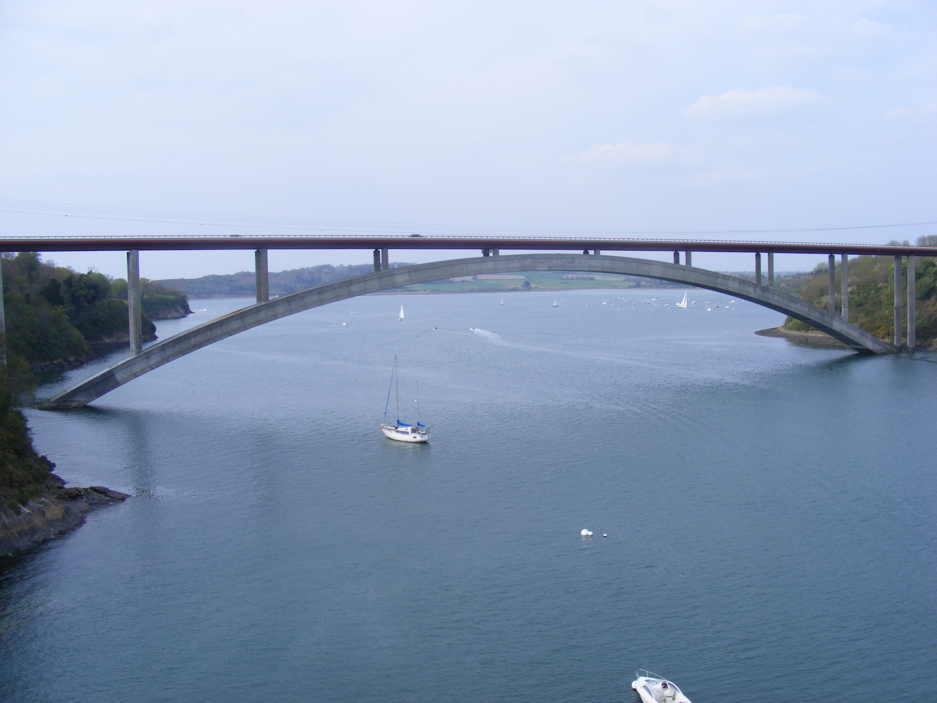 Le pont Châteaubriand vu depuis le pont Saint-Hubert.